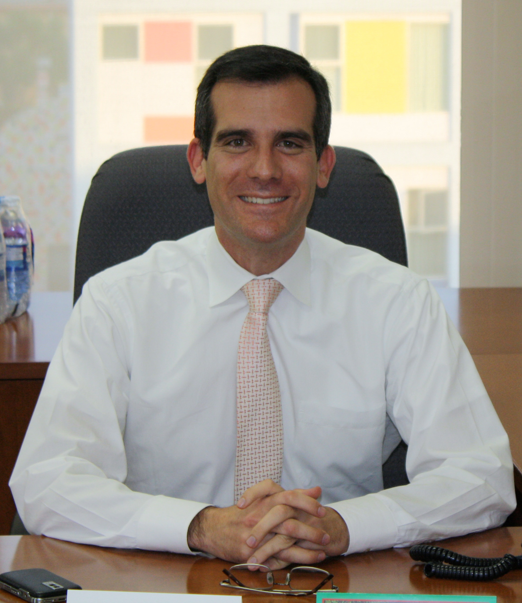 Los Angeles Mayor Eric Garcetti